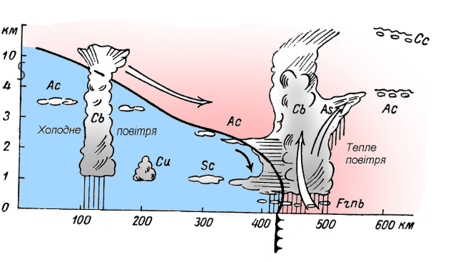 Структура холодного фронту на українській мові